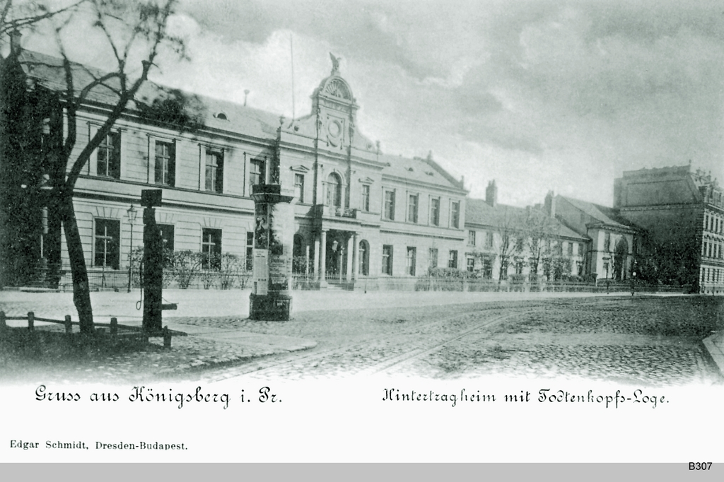 Königsberg